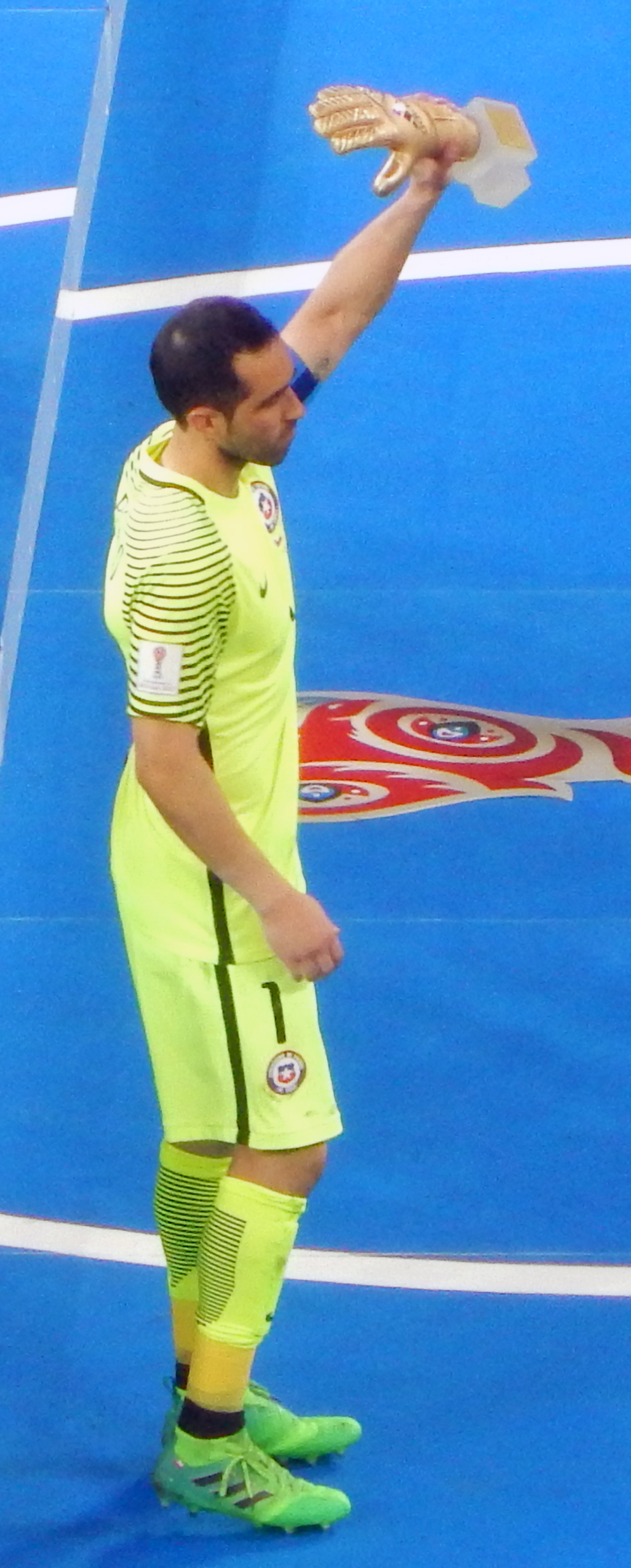 Финал Кубка конфедераций 2017